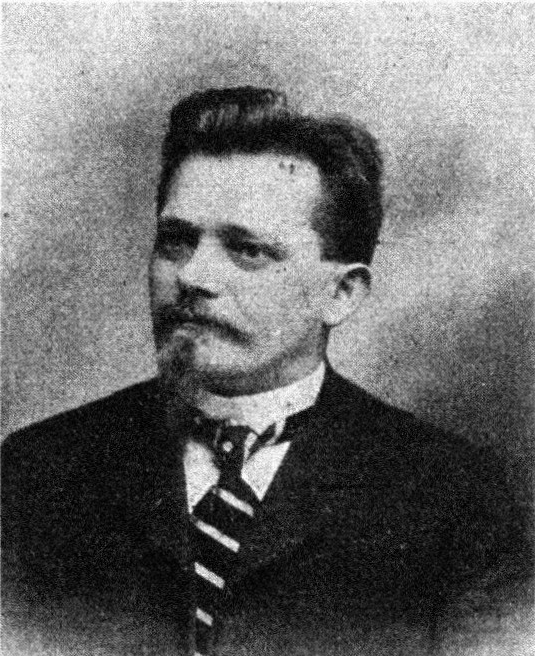 Österreichischer Politiker, Reichsratswahl 1907, Name siehe Dateiname